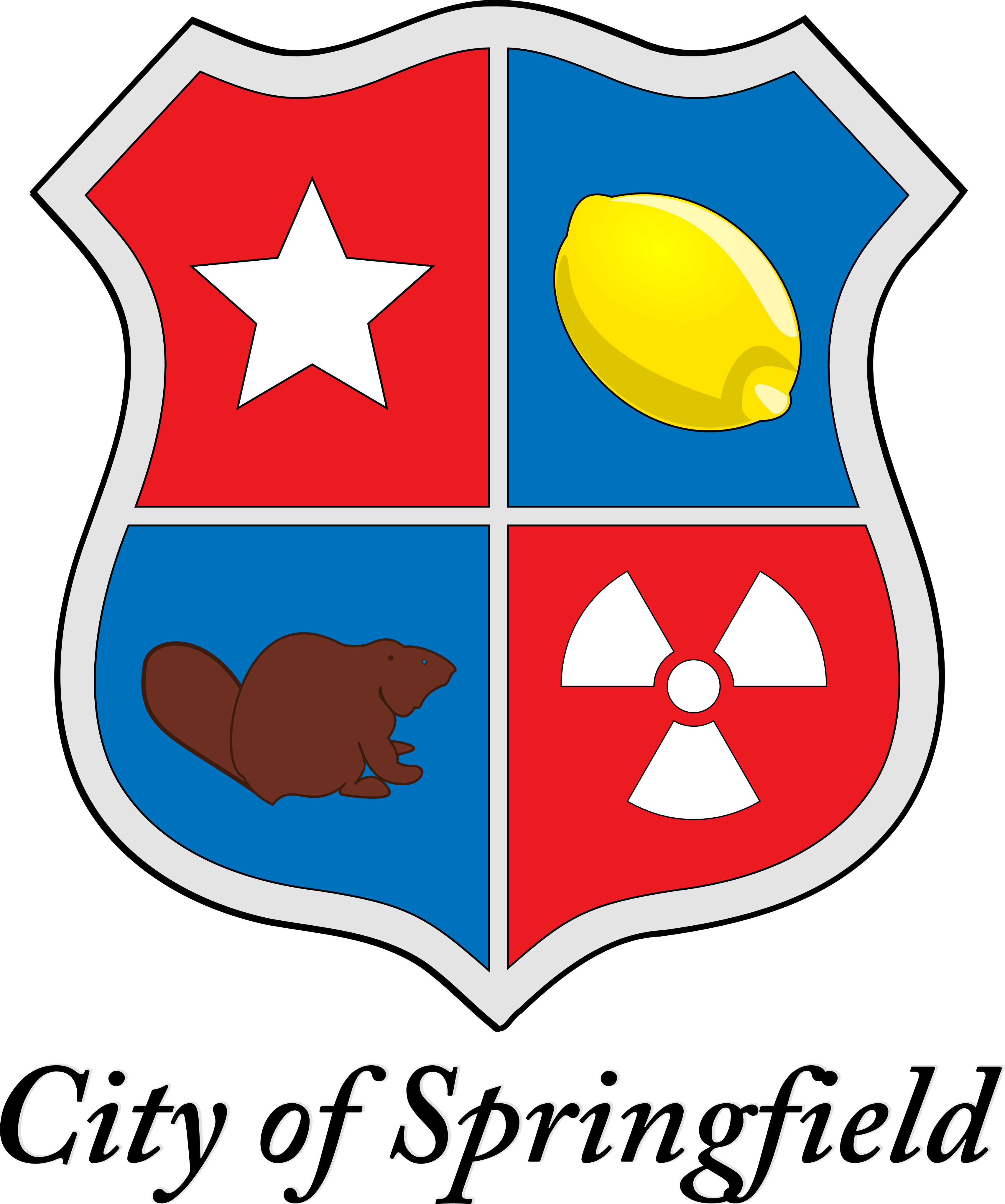 Escudo de armas de la Ciudad de Springfield. Las siguientes imágenes de Wikimedia Commons fueron utilizadas para crear está imagen: File:Escudo de Miraflores (Boyacá).svg by BrCaLeTo (talk · contribs). File:LOGO WIGIERSKIEGO PARKU NARODOWEGO.svg by MARCIN N (talk · contribs). File:Radioactive White.svg by ChNPP (talk · contribs). File:Lemon.svg by Tuxpaint.